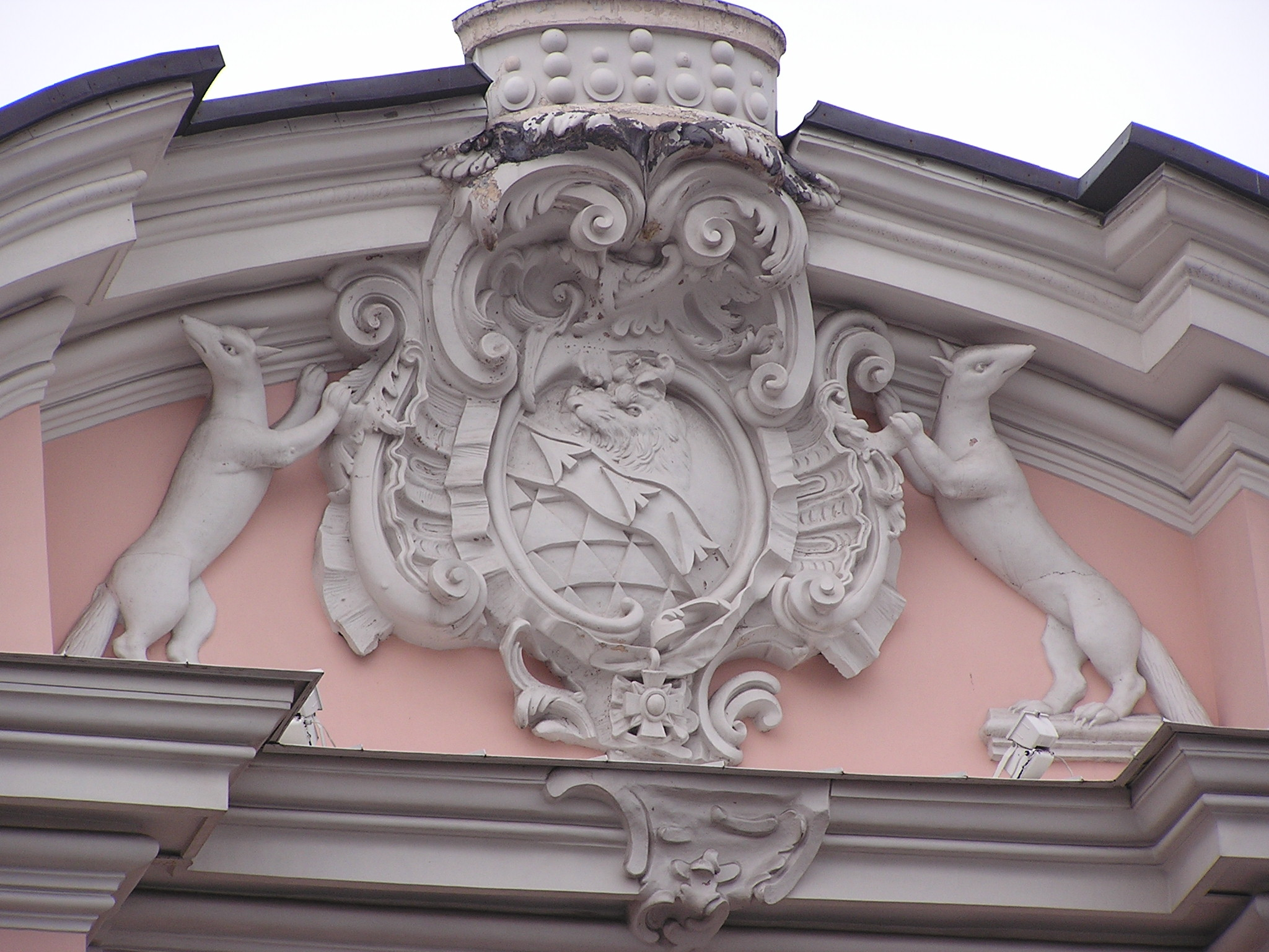 Санкт-Петербург. Герб Строгановых на Строгановском дворце